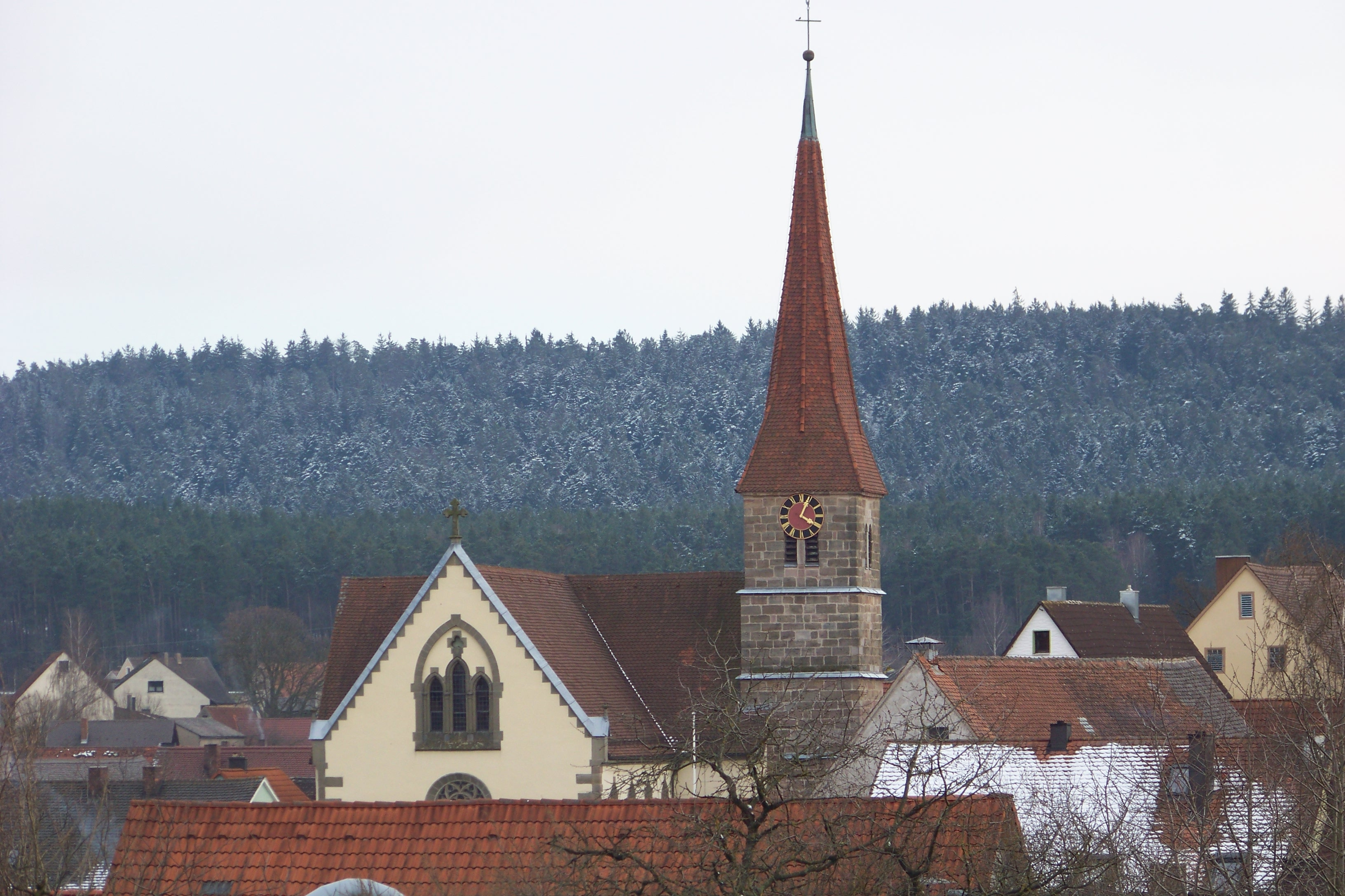 St. Nikolauskirche in Mitteleschenbach